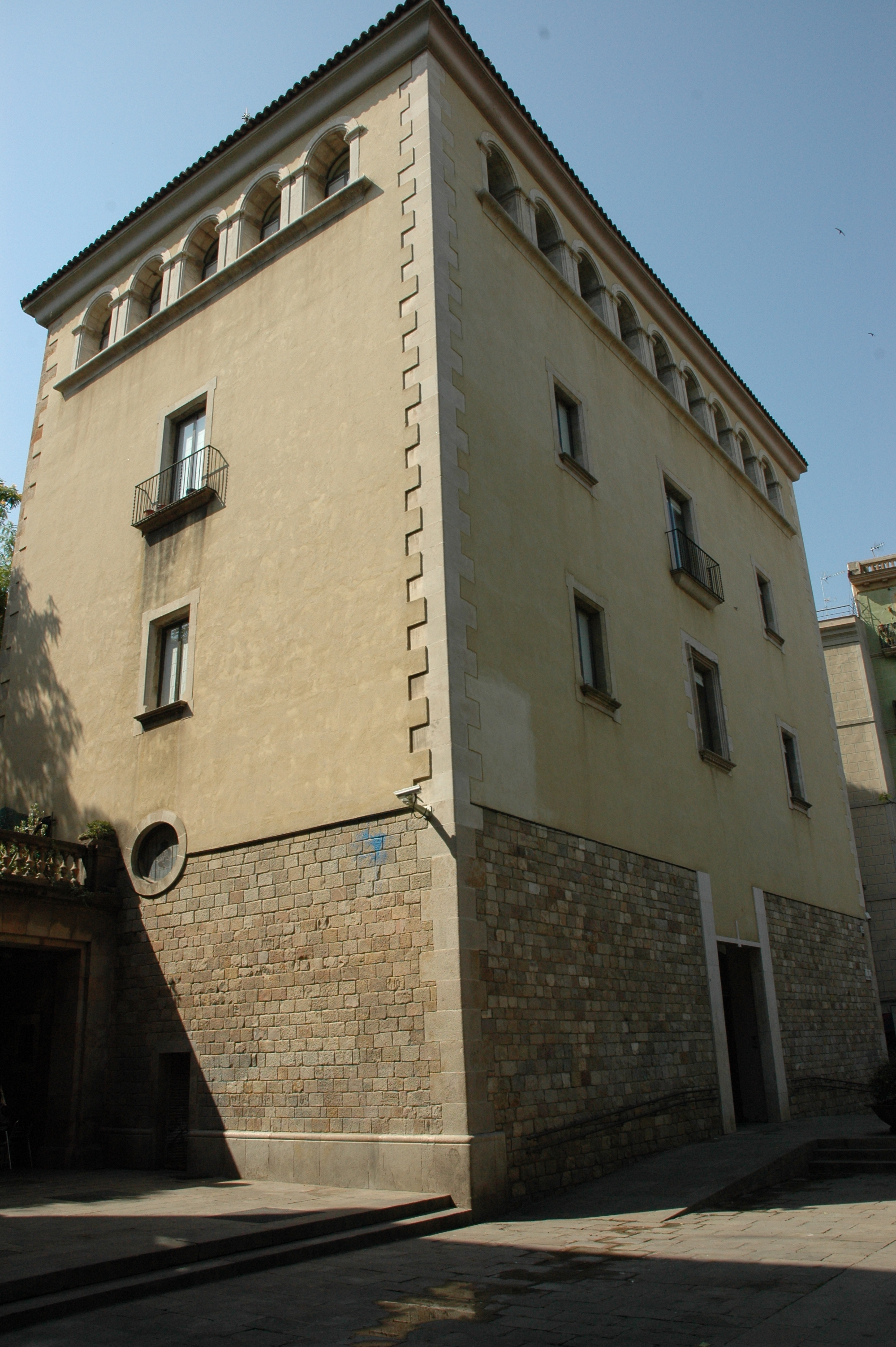 Antic Convent del Bonsuccés